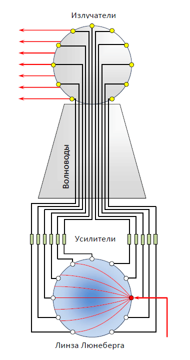 Принцип действия радара AN/SPG-59 с линзой Люнеберга. Линза Люнеберга преобразует сферическую волну точечного излучателя в луч с плоскими волновыми поверхностями. Фазовая картина снимается приёмниками и после усиления передаётся по волноводам на излучающие элементы антенны, которые воспроизводят фазовую картину в пространстве, формируя узко направленный луч.